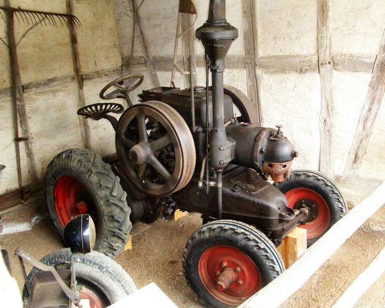 Lanz Bulldog Schlepper (Typ HL) Hersteller: Heinrich Lanz AG, Mannheim Baujahr: 1928, Motor: 1 Zylinder Glühkopf 2-Takt liegend, 6234 cm³, 12 PS, Wasser-Verdampfungskühlung Treibstoff: alles von Teeröl bis Benzin Getriebe: 1 Gang, vor- oder rückwärts, je nach Motorlaufrichtung, Hinterradantrieb Gewicht: 1670 kg Geschwindigkeit: 4,3 km/h max.